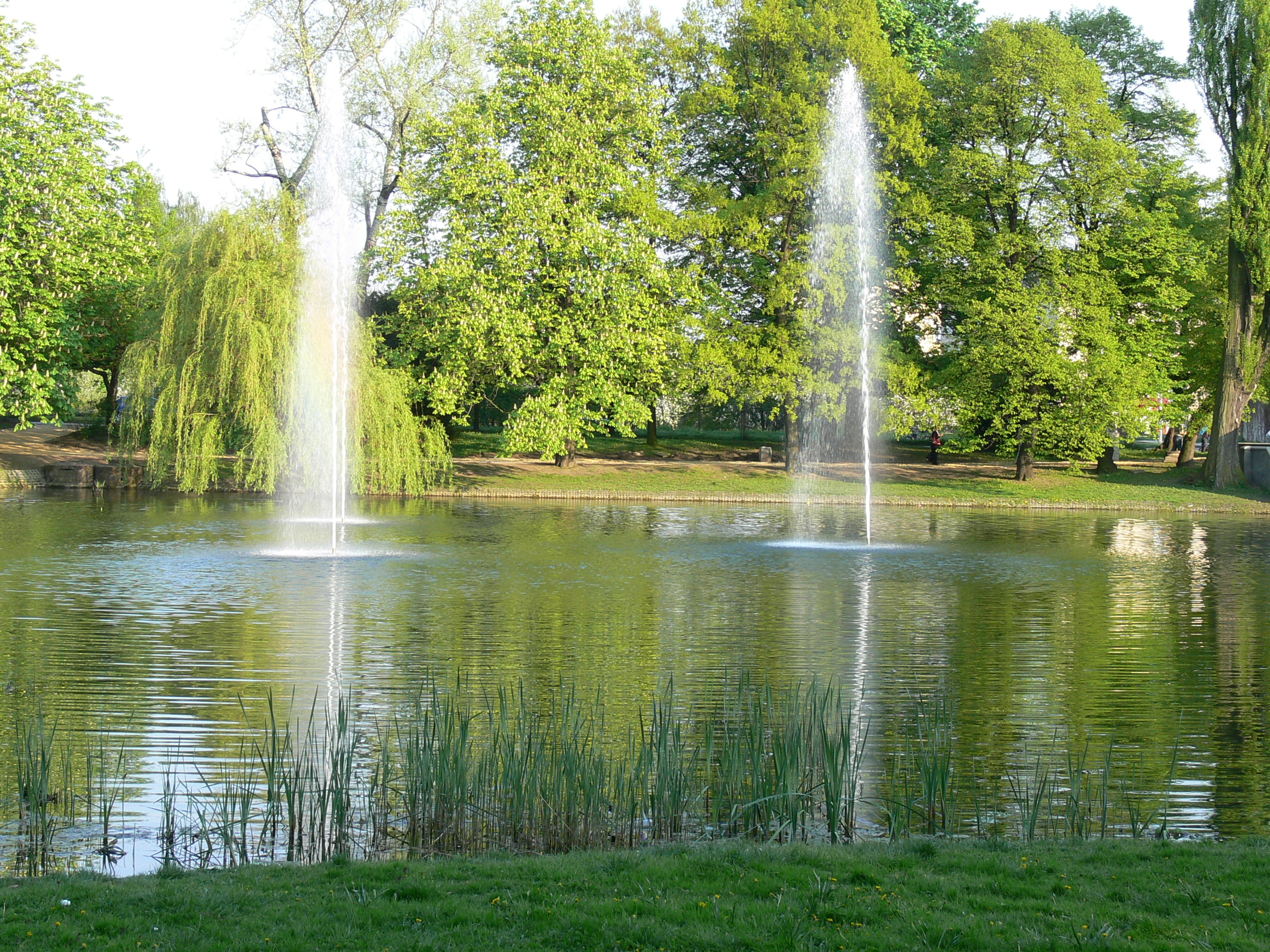 Racibórz — Park im. Miasta Roth: staw i fonatnny